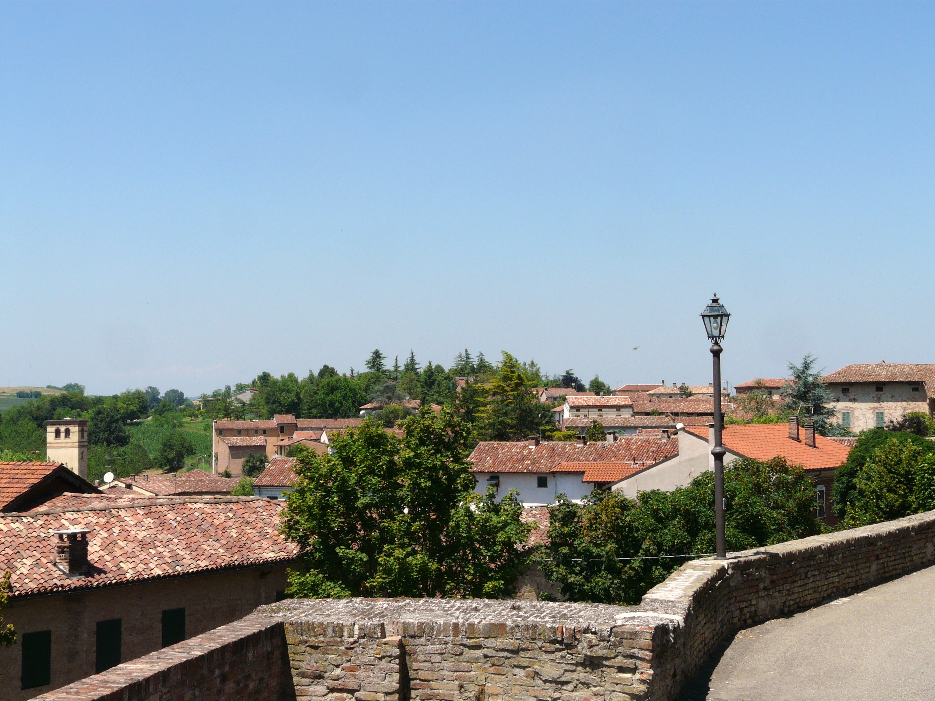 Panorama di Altavilla Monferrato, Piemonte, Italia